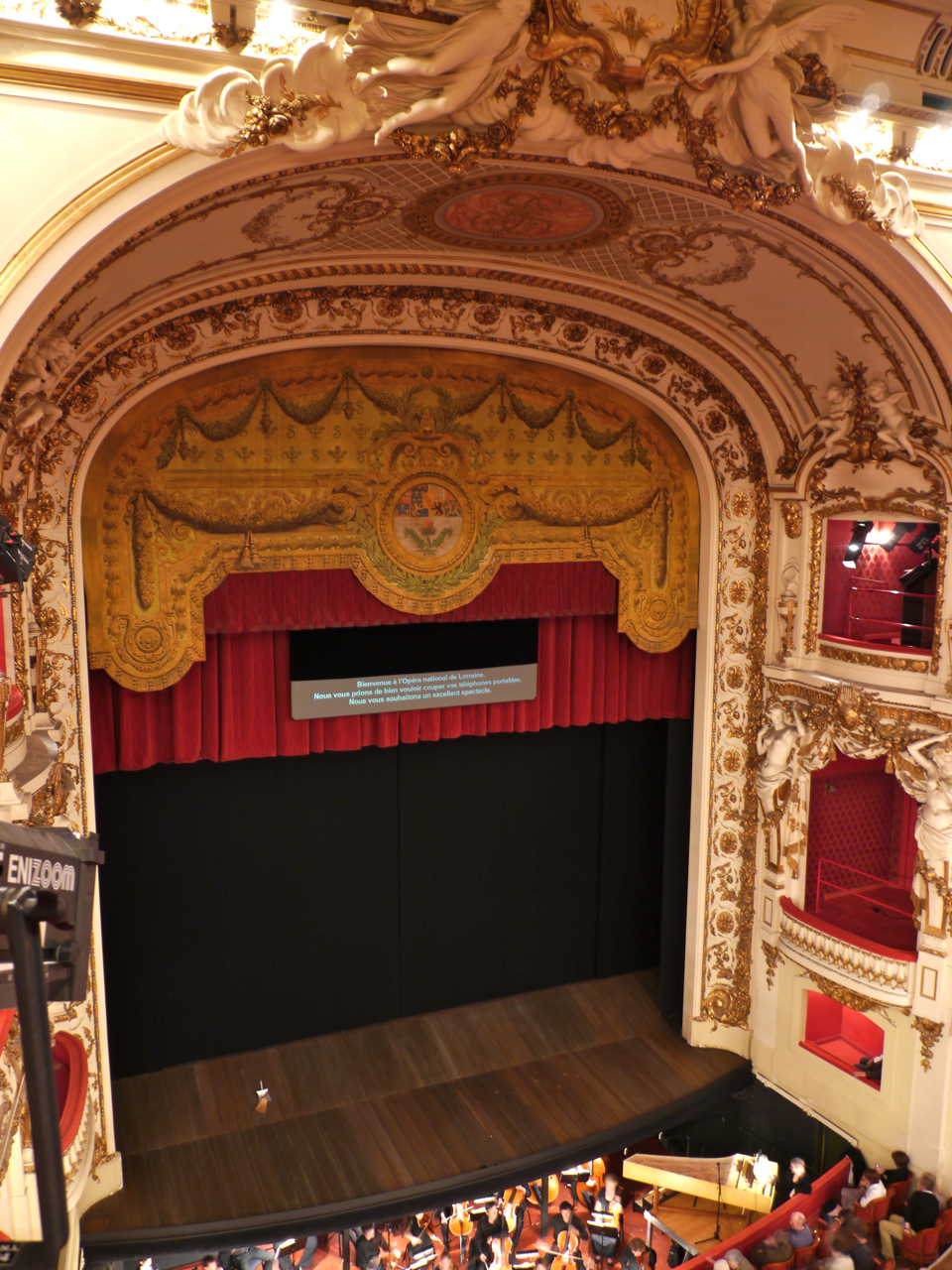 Vue sur la scène de l'Opéra national de Lorraine avec l’orchestre symphonique et lyrique de Nancy, en fosse.